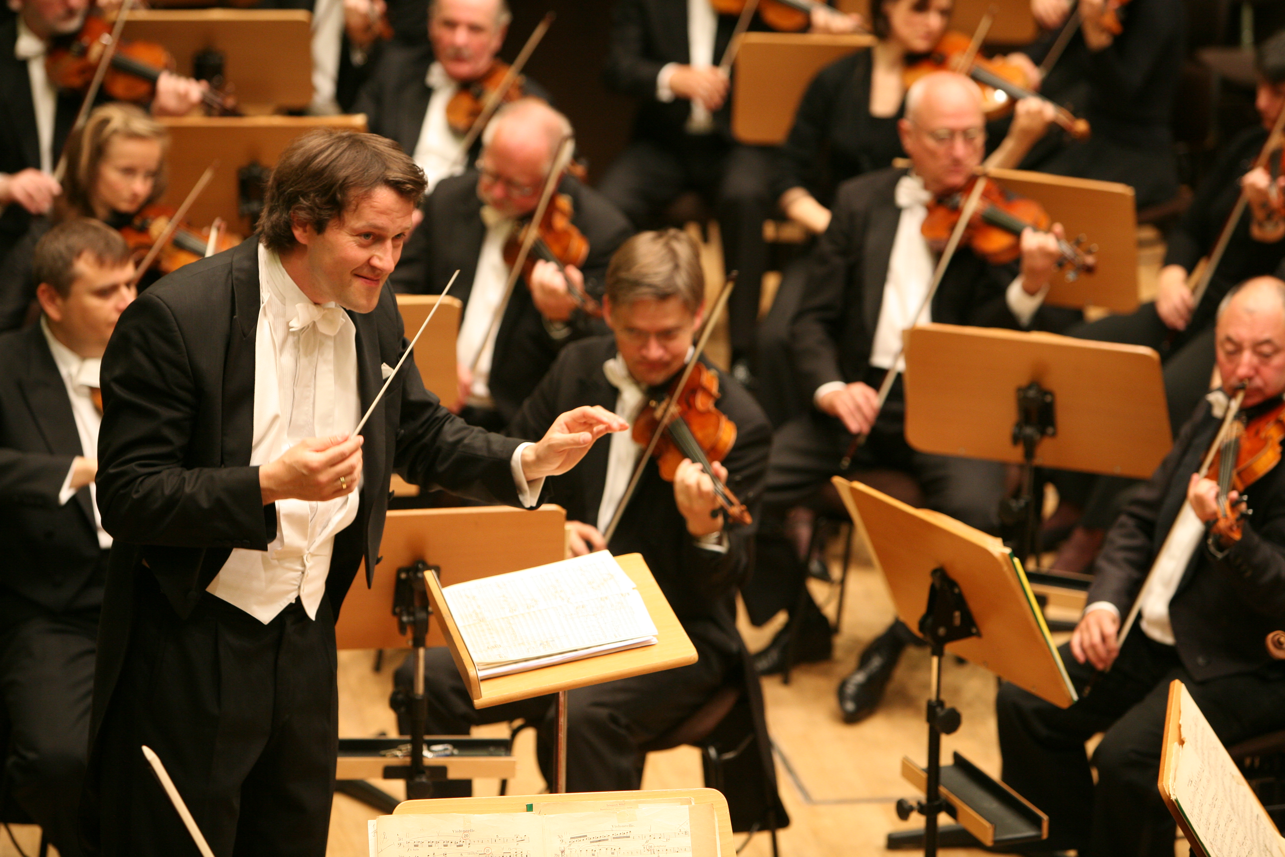 GMD Markus Poschner und Bremer Philharmoniker